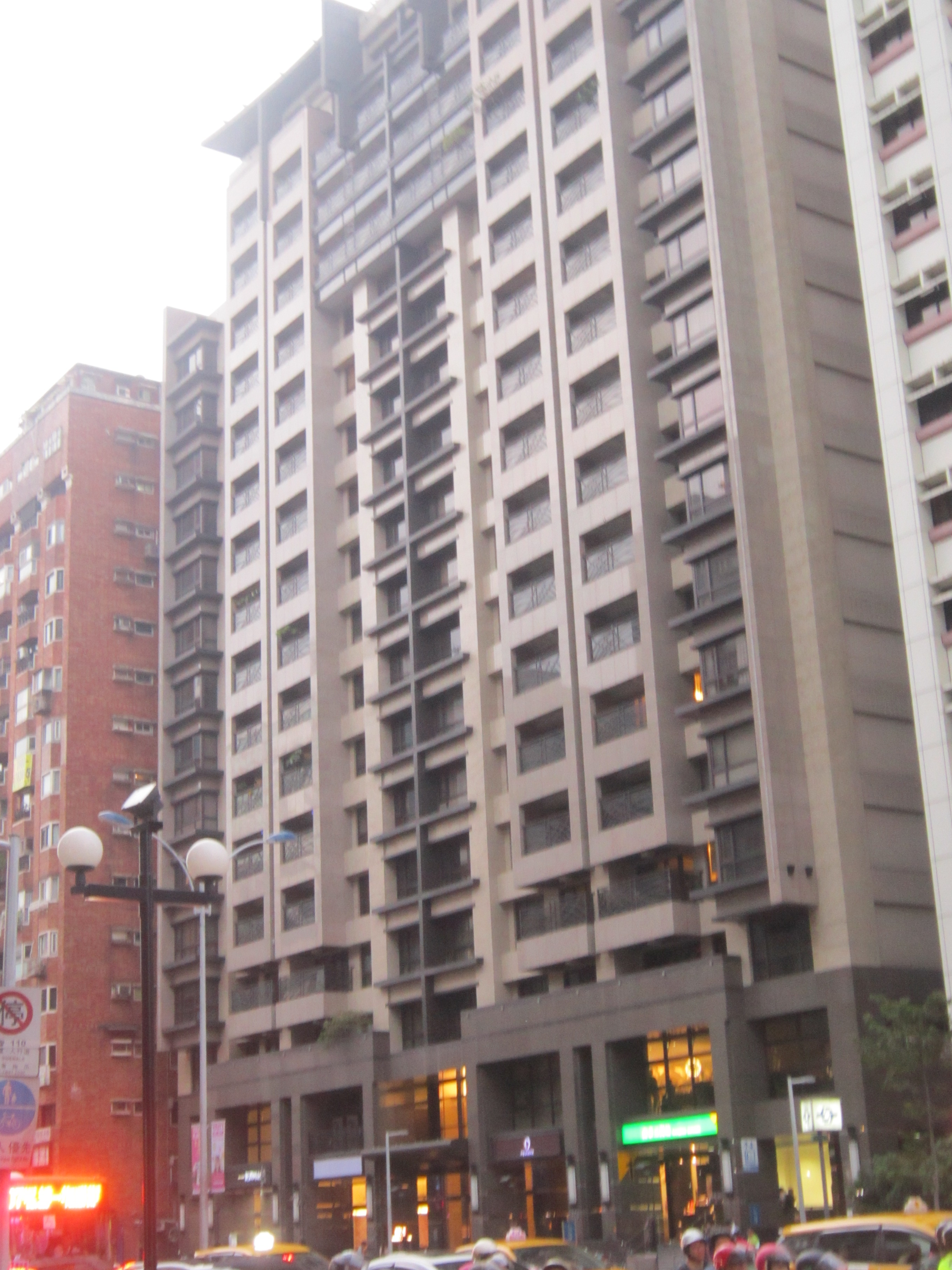 興富發建設位於南京三民站1號出口的聯開共構大樓(案名:藏富)